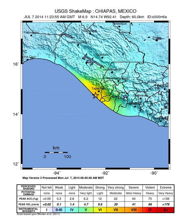 Mapa de intensidad del sismo en Chiapas 2014.